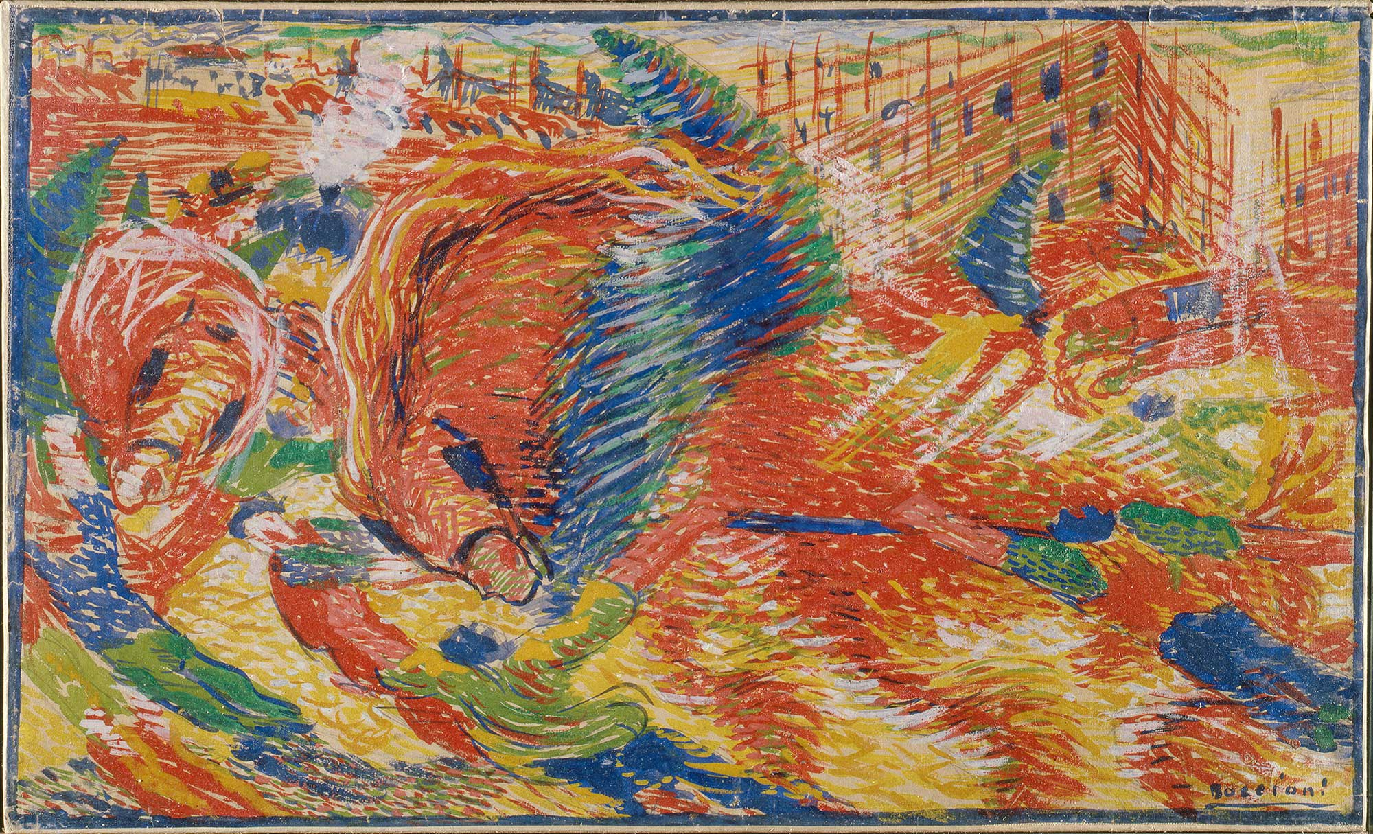 sketch